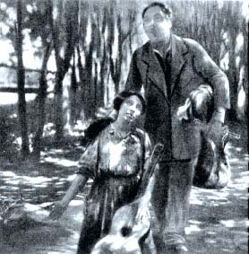 Virginia Balistrieri e Giovanni Grasso sr. in Sperduti nel buio (Martoglio, 1914)